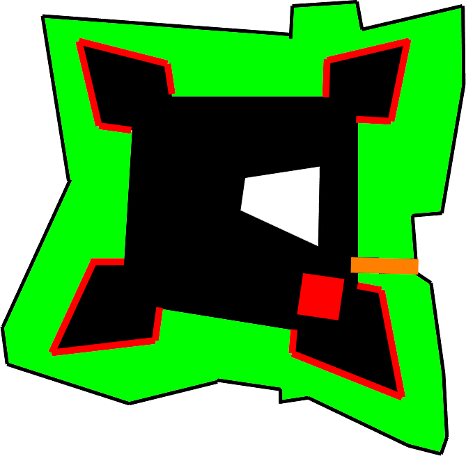 castello di copertino visto dall'alto